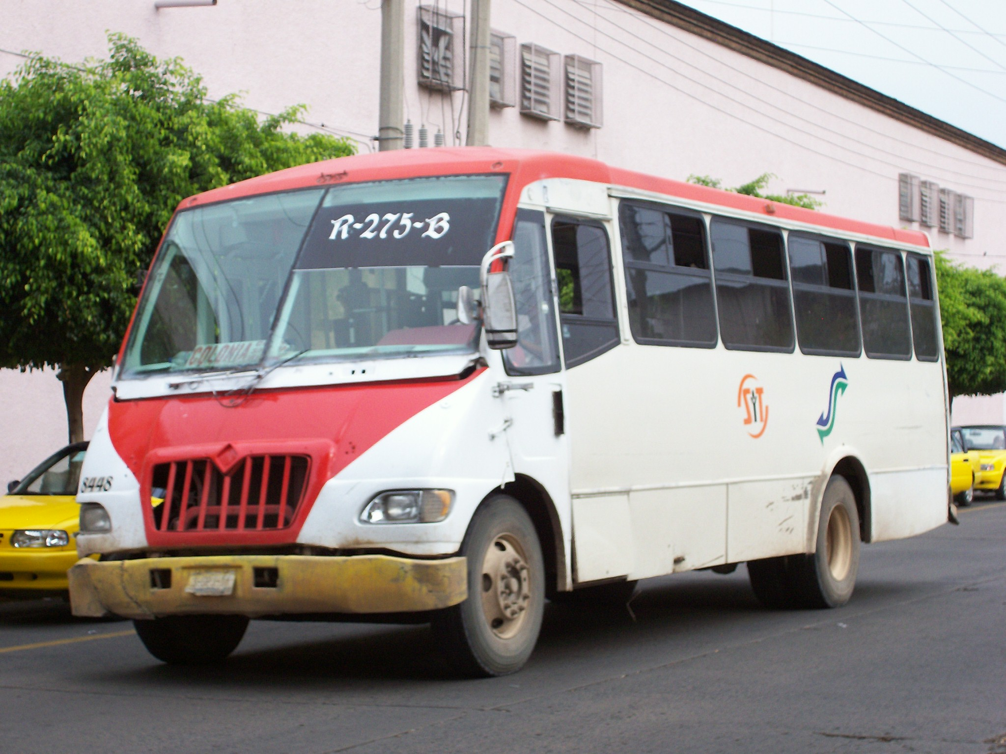 Autobus de la empresa de Transporte guadalajara, Servicios y Transportes O.P.D.